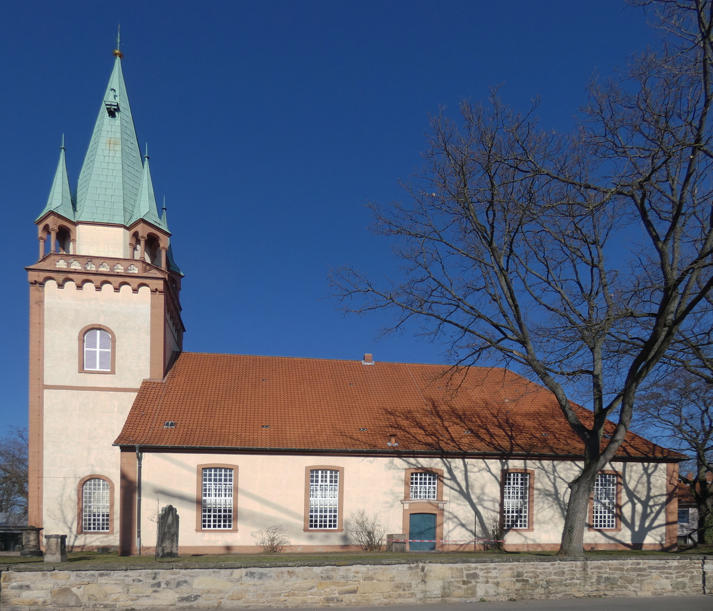 Die Kirche St. Martin in Seelze, Region Hannover, Niedersachsen.